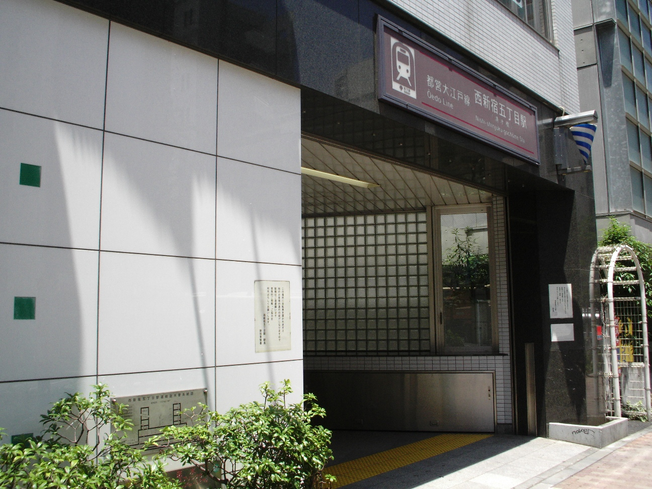 西新宿五丁目駅 A1出入口